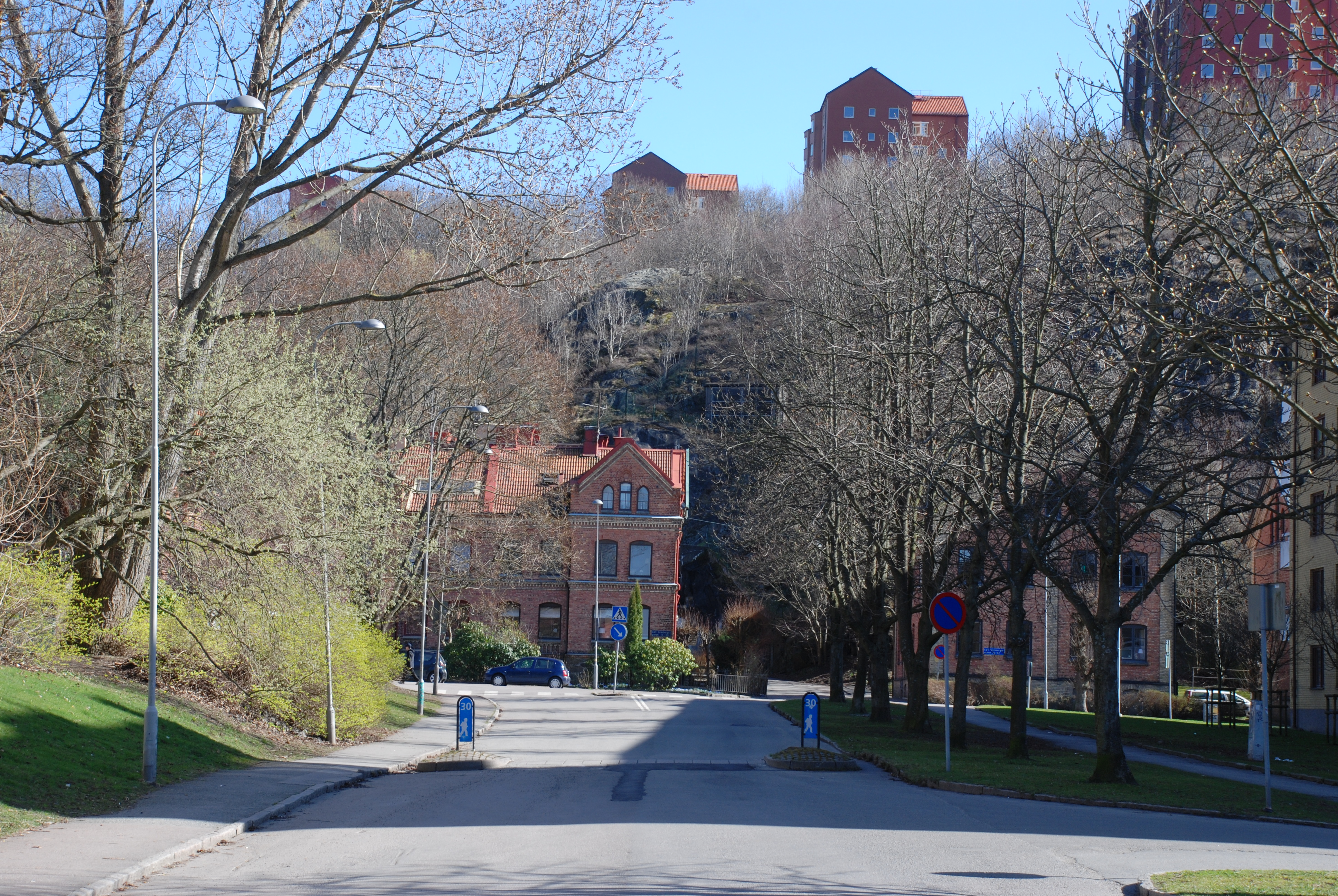 Brunnsgatan i stadsdelen Annedal i Göteborg i riktning mot Carl Grimbergsgatan.